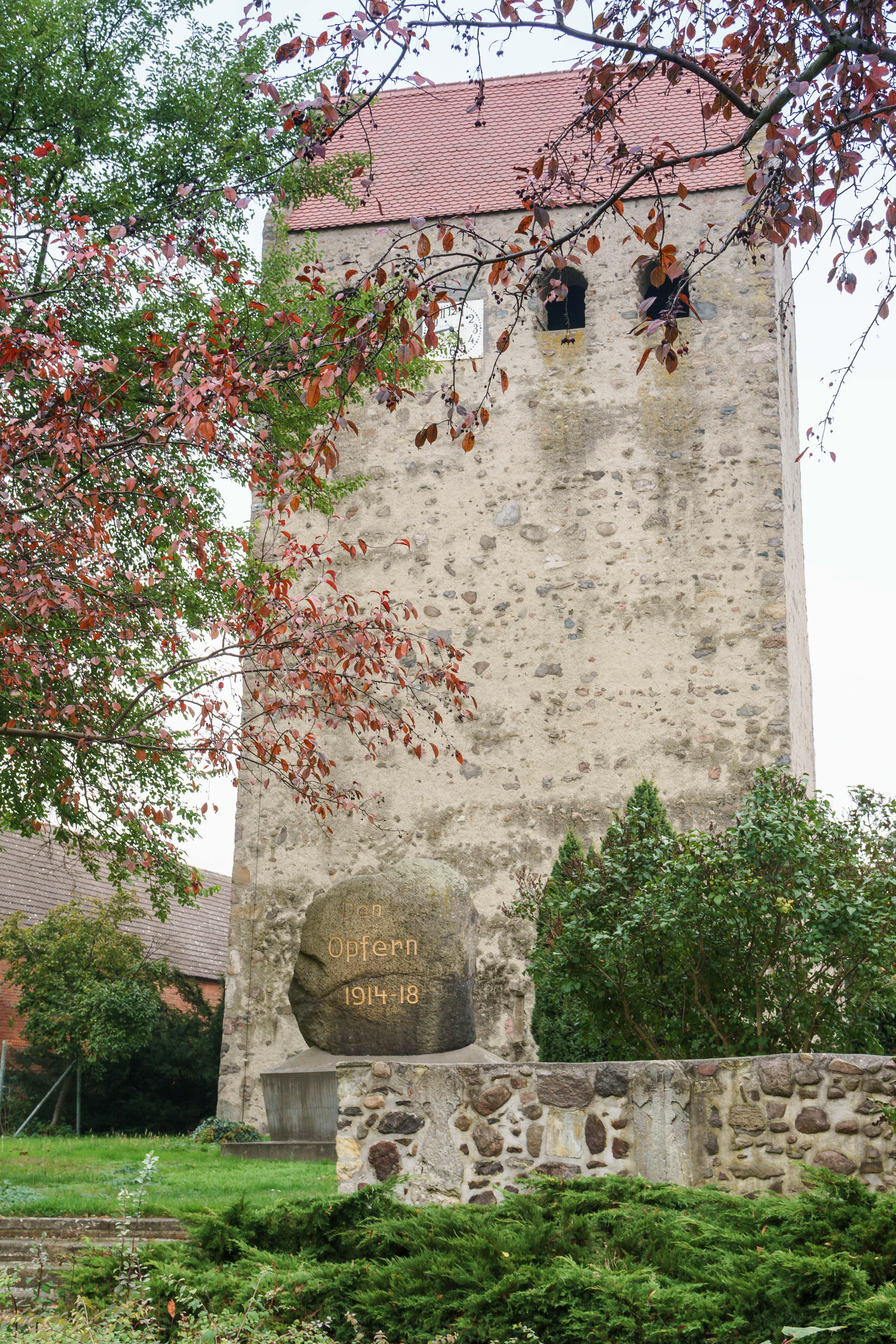 Steinkreuz, Kreuzstein, Gefallenendenkmal 1914-18, Kirche in Körbelitz